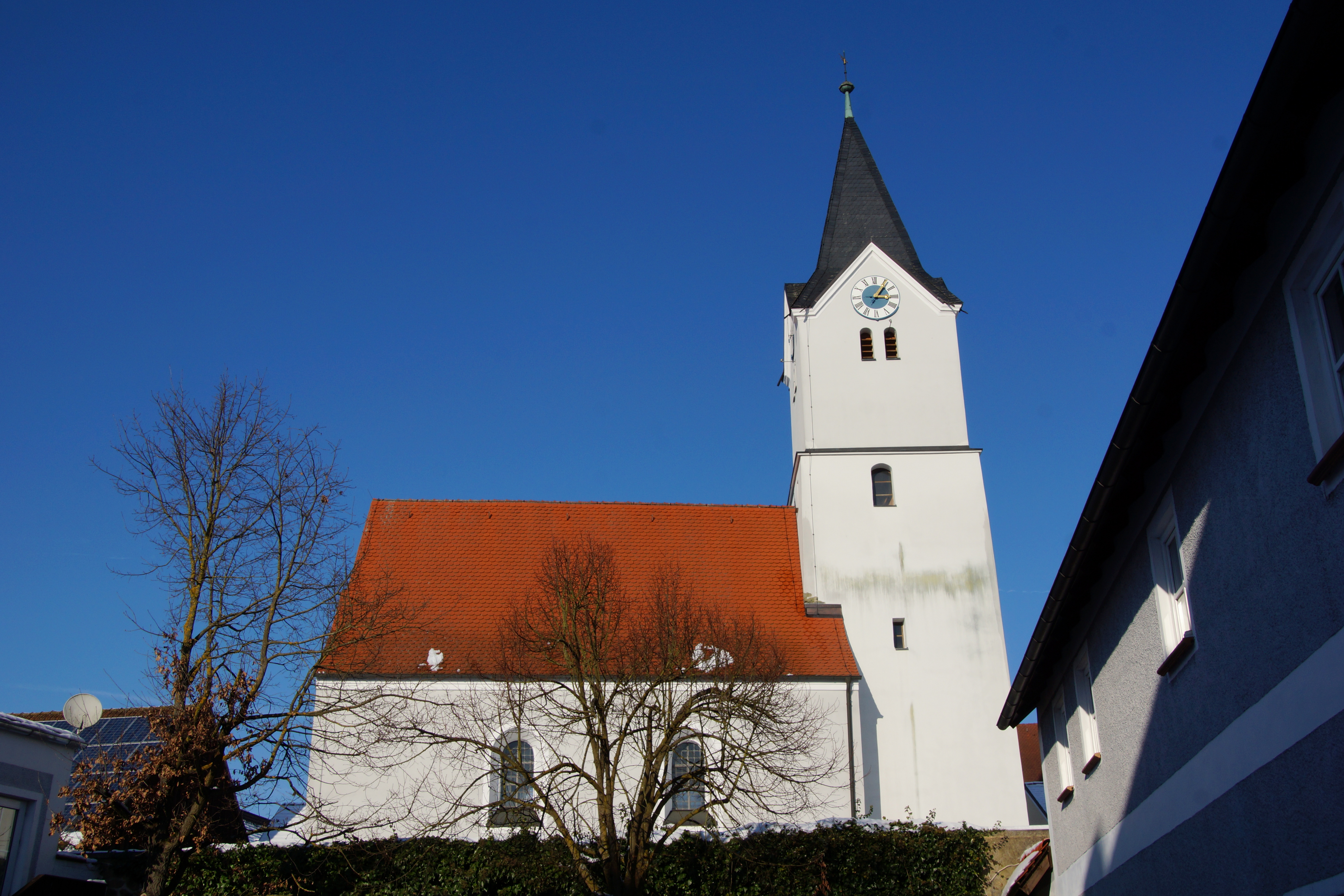 Die ehemalige Pfarrkirche St. Nikolaus im Oberpfälzer Trisching